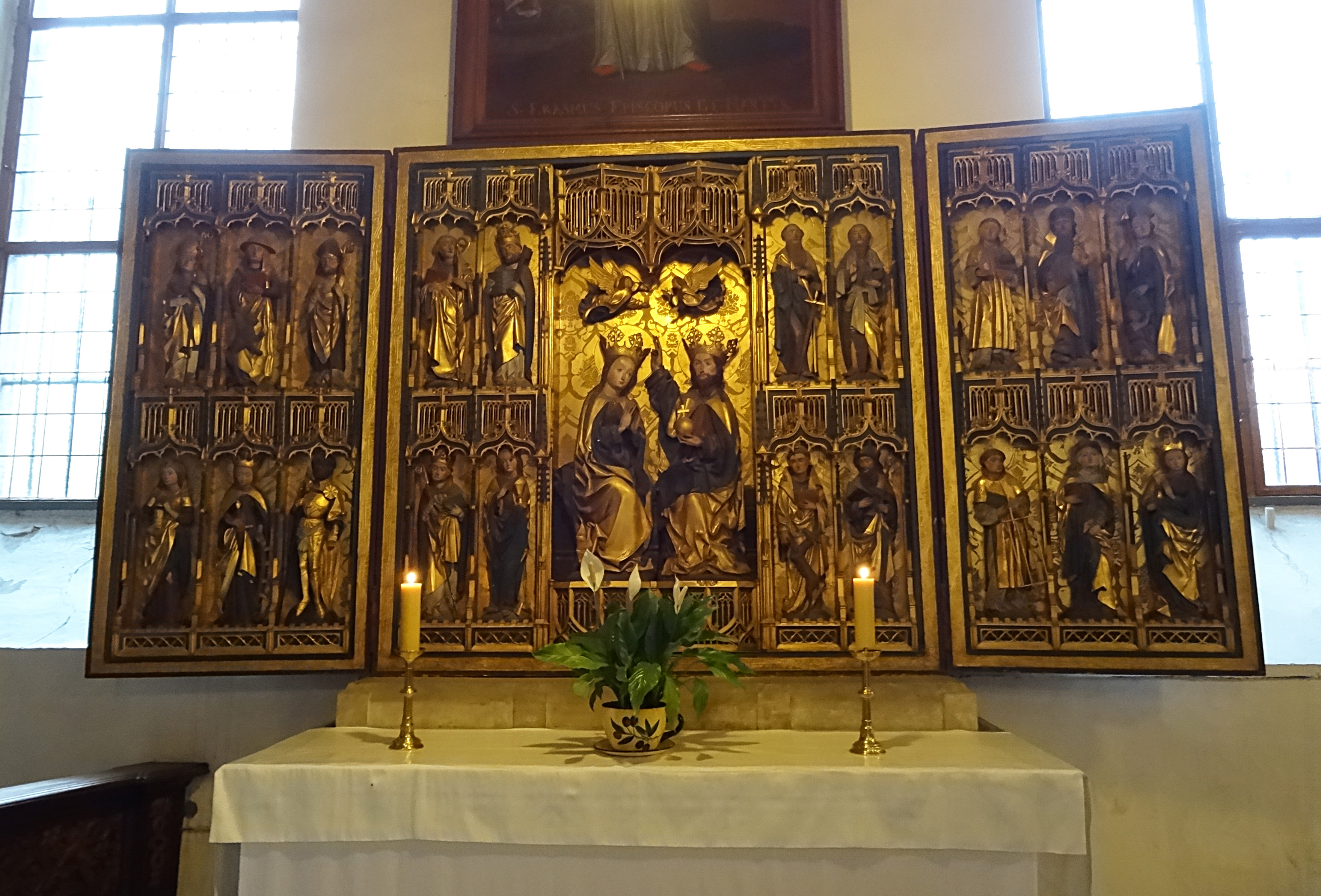 der alte Flügelaltar der Klosterkirche Meyendorf